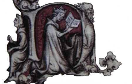 Jeanne d'Évreux